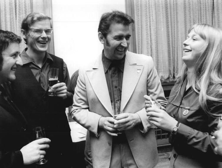 Berlin, Günther Jahn im Gespräch ADN-ZB Katscherowski 28.9.73 Berlin: Auszeichnung- Für hervorragende Leistungen in dern Landwirtschaft während der diesjährigen Getreideernte wurden am 28.9.73 im Hause des Zentralrates der FDJ 74 Mitglieder des sozialistischen Jungedverbandes geehrt. Nach der Auszeichnung im herzlichen Gespräch: Günther Jahn, 1. Sekretär des Zentralrates (2.v.r.) , und Reiner Schuster, Roland Philipp u. Inge Ehrler (vlnr).